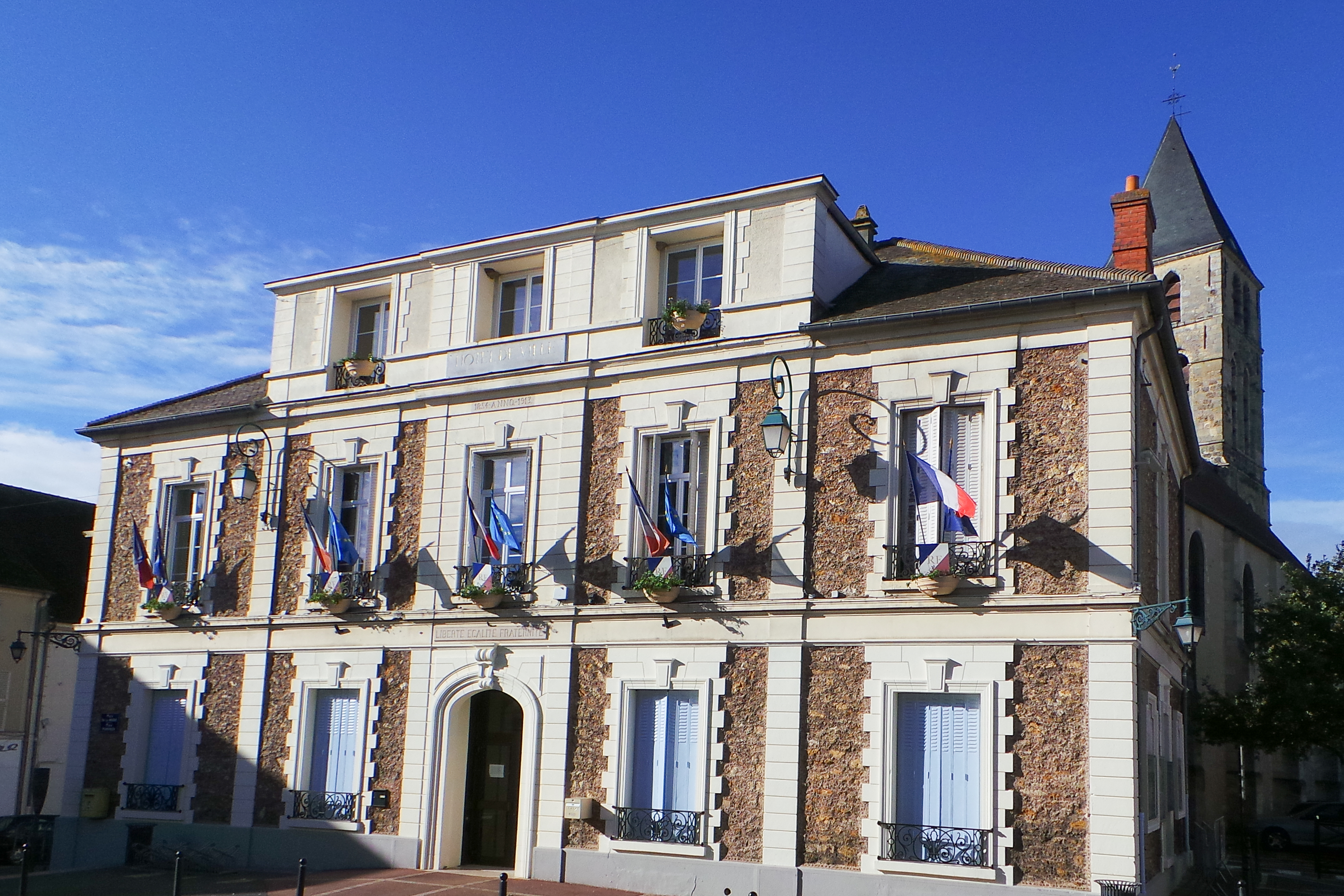 Mairie de ville de Mennecy / Mennecy, Essonne, France